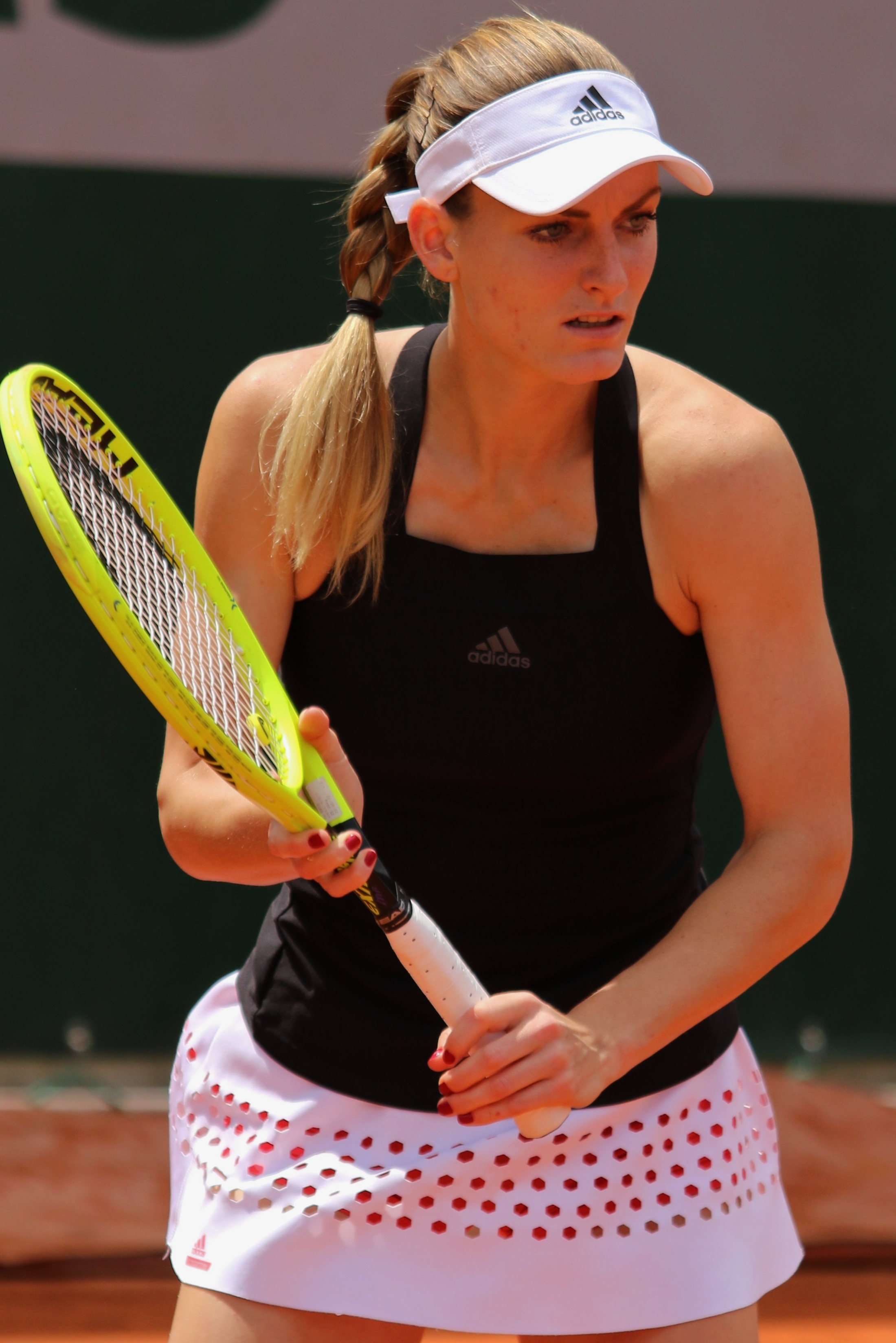 Knoll RG19 (15)